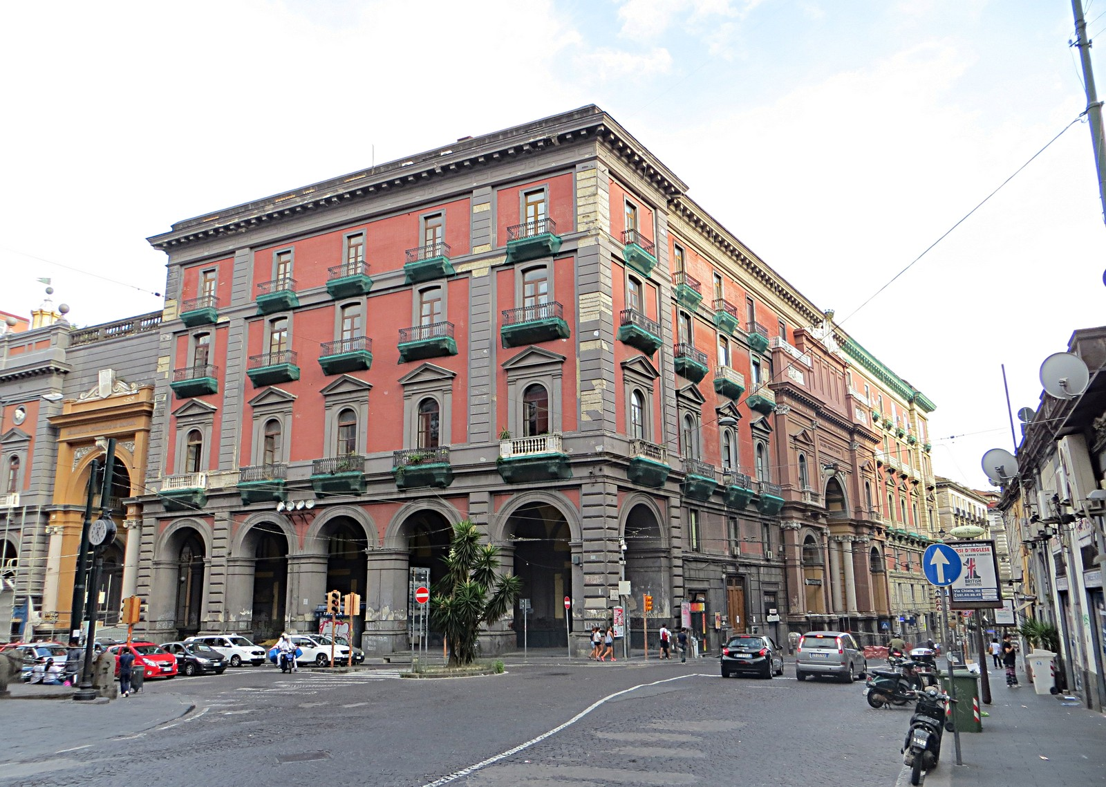 Via Enrico Pesina - Galleria Principe di Napoli